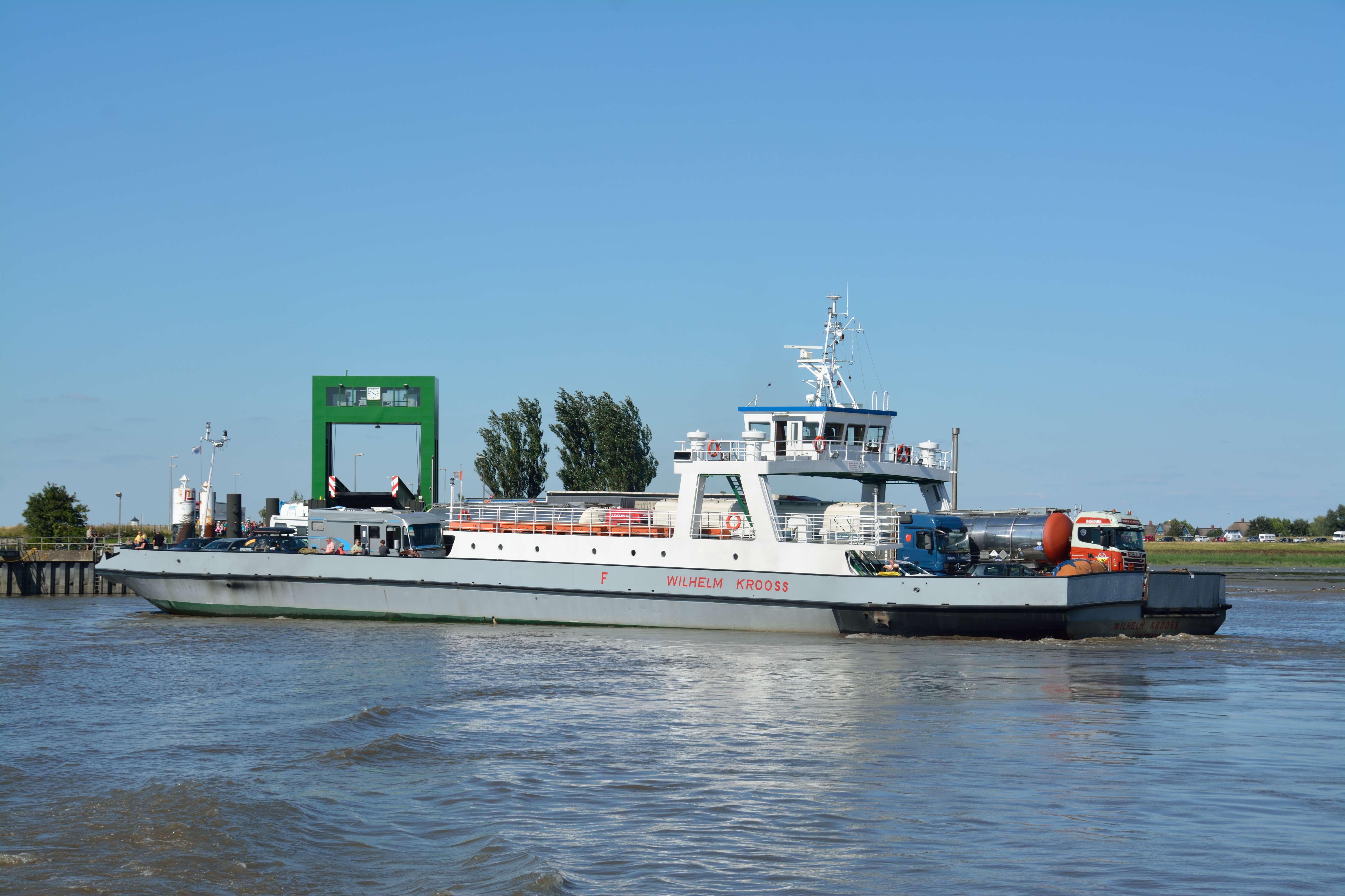 Impressionen einer Hin- und Rückfahrt über die Elbe.